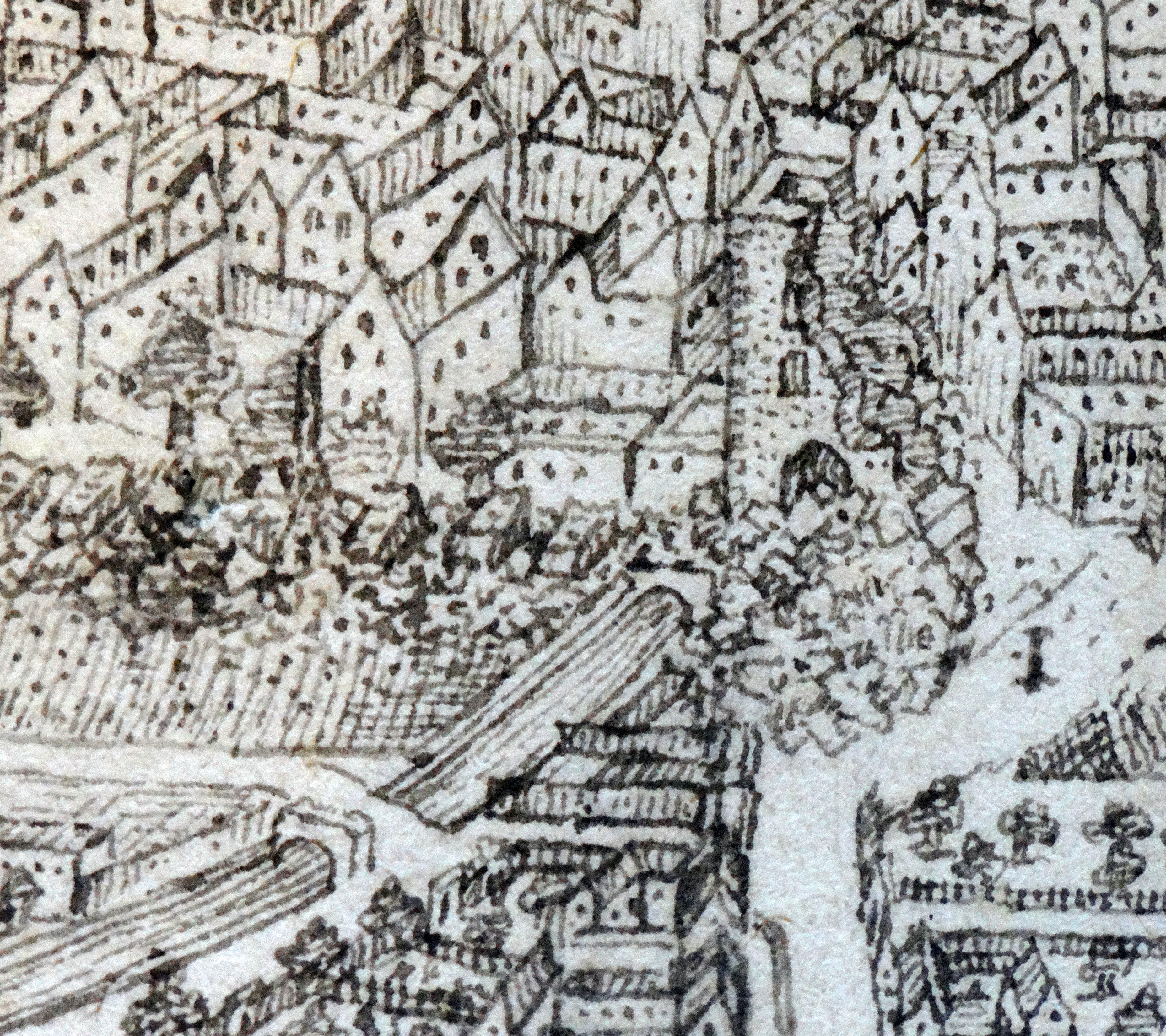 Eisbacheinlass durch die innere Stadtmauer von Worms. Detail aus: Peter Hamman: Ansicht der Stadt Worms nach der Zerstörung 1689 von Süden. Stadtarchiv Worms, Abt. 1B, Nr. 48.